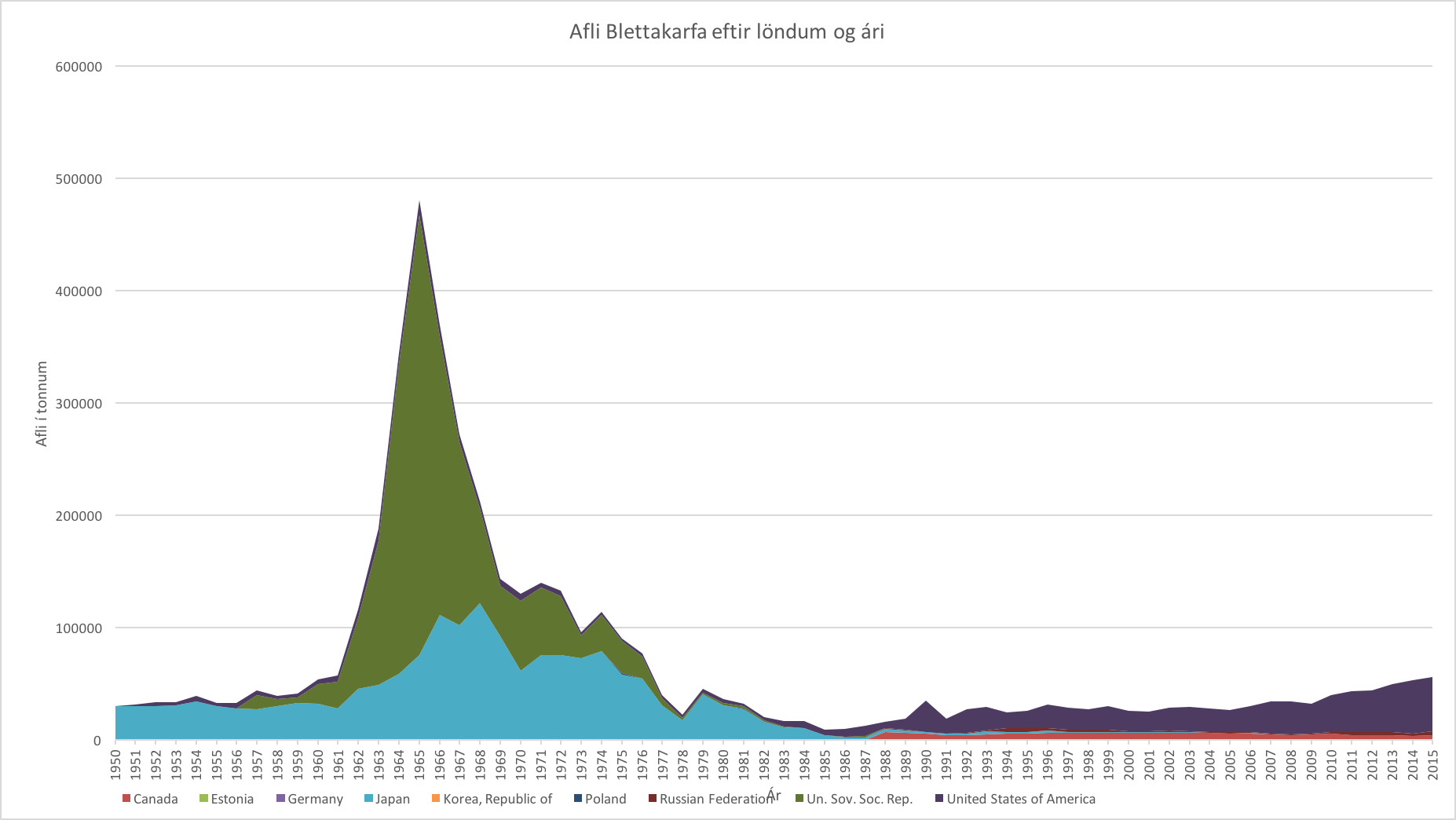 Veiðar á blettakarfa eftir ári og löndum